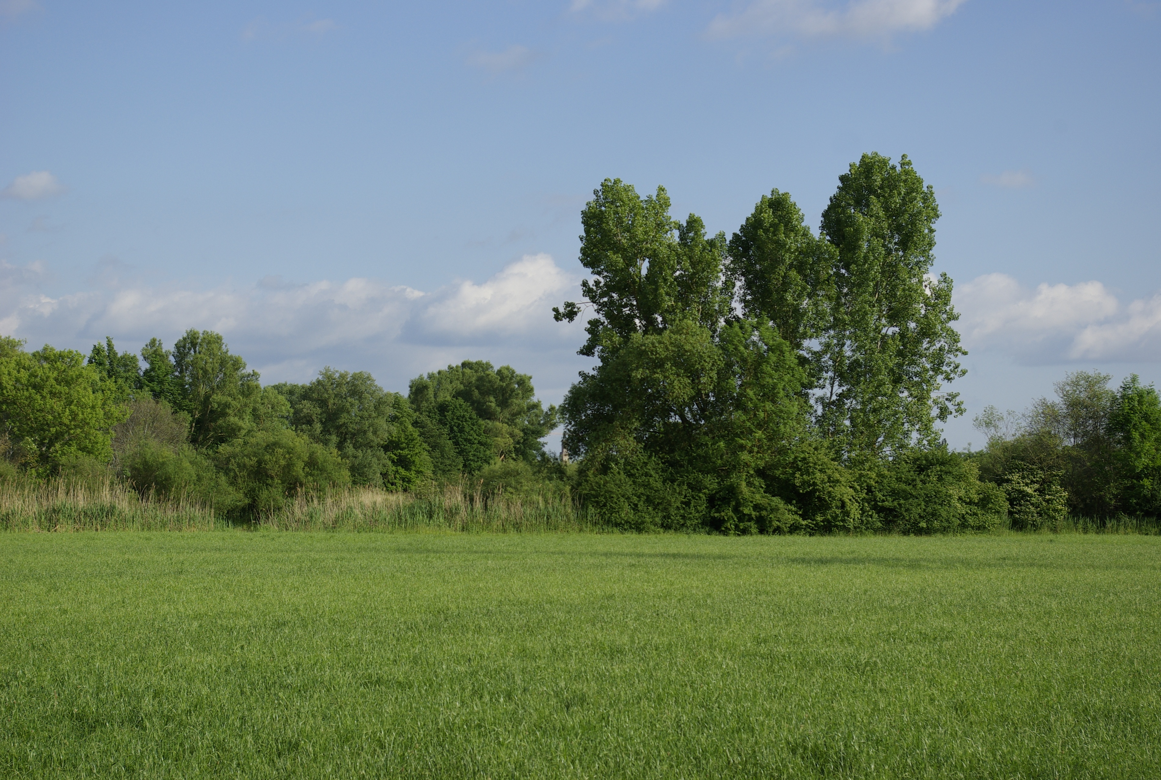 Das Regnitztal in Fürth ist Teil des Landschaftsschutzgebietes Rednitz-, Pegnitz- und Regnitztalsystem.